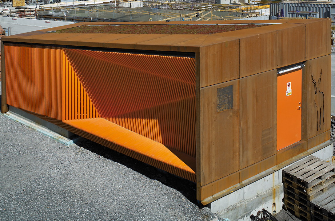 En av Fortum Distributions nätstationer i Norra Djurgårdsstaden har nominerats till två arkitekturpriser: Stålbyggnadspriset och utmärkelsen ”Årets Stockholmsbyggnad 2015”